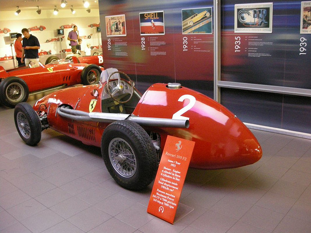 . Como pusiera todos los coches que fotografiÉ, os ÍBais a hartar .